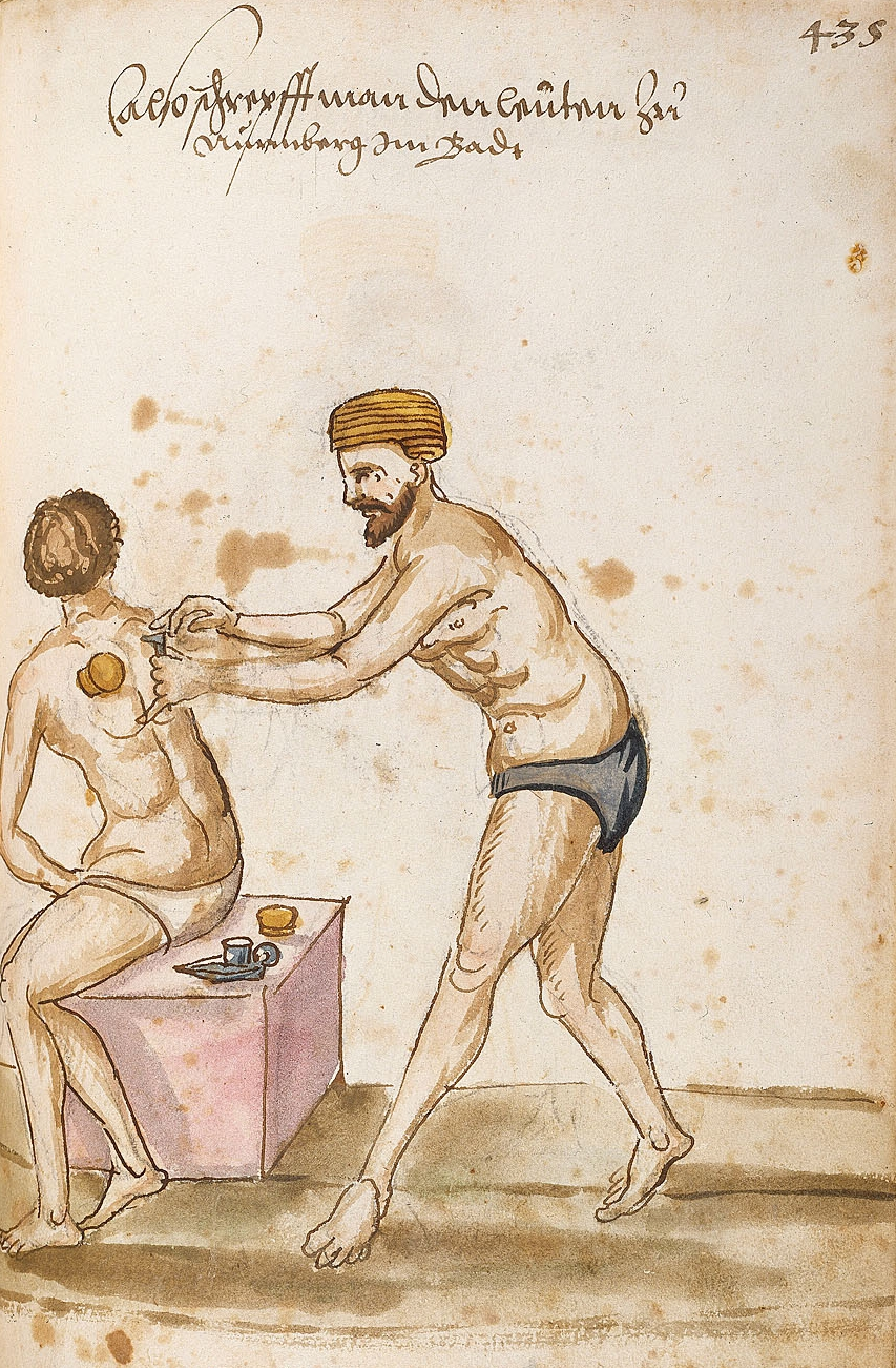 Ein Bader setzt Schröpfköpfe an. Handzeichnung